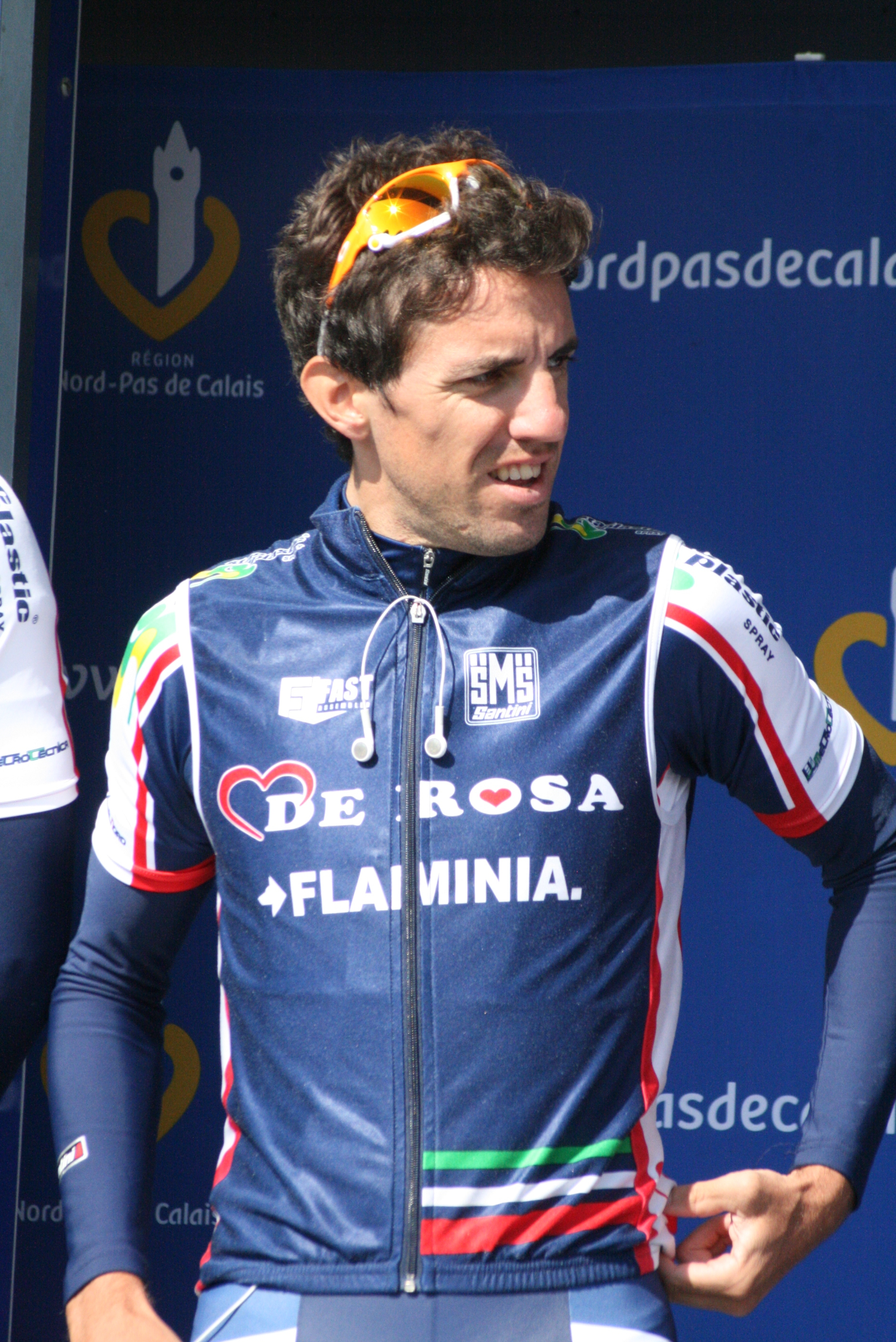 Présentation des coureurs au départ de la première étape Paolo Bailetti